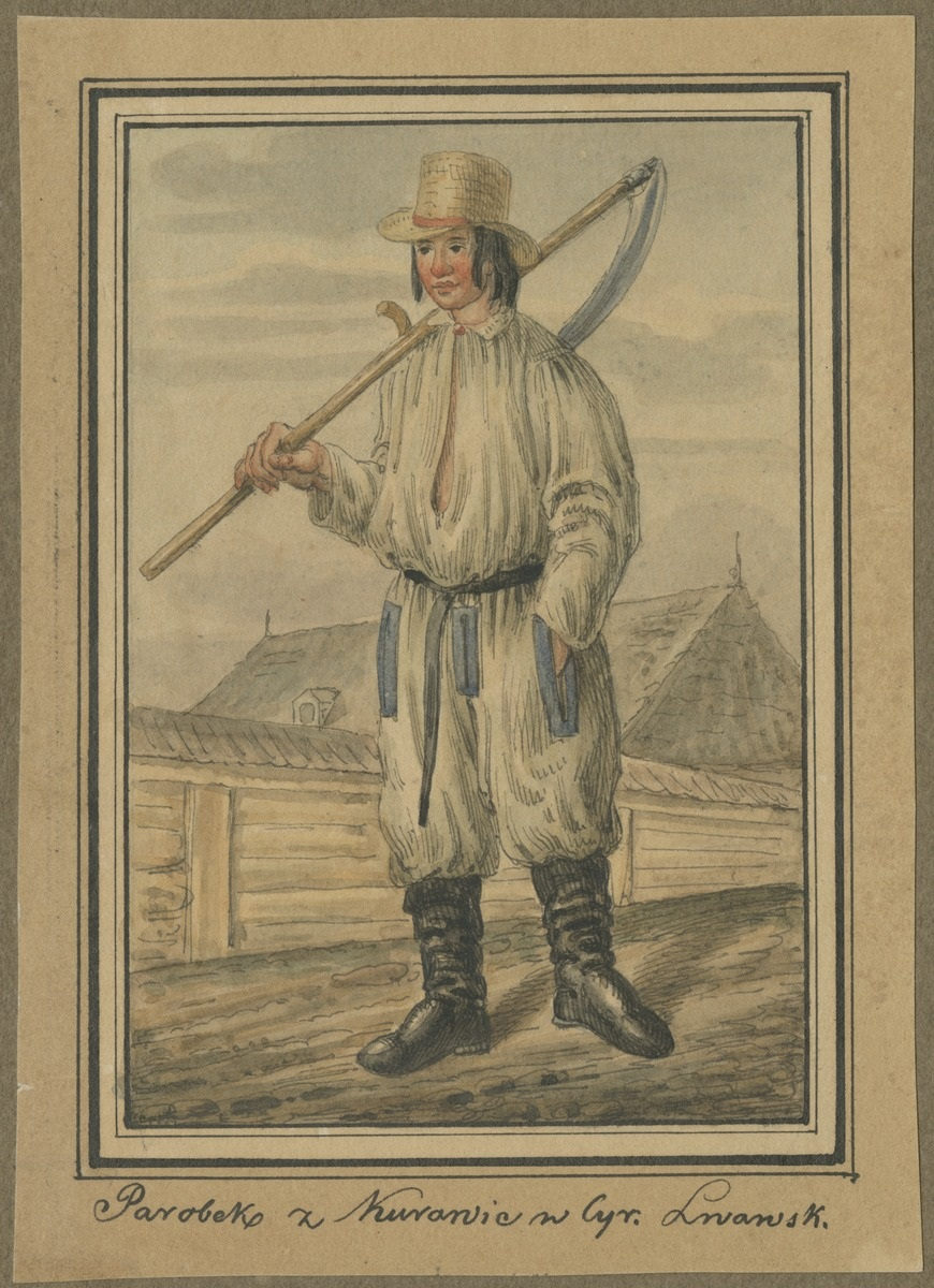 Parobek z Kurowic w Cyr. Lwowsk.; na odwrocie: rys.z nat.1836. Młody żniwiarz z kosą na ramieniu, w słomkowym kapeluszu i białej koszuli, na tle parkanu. Львівський повіт. Куровичі.